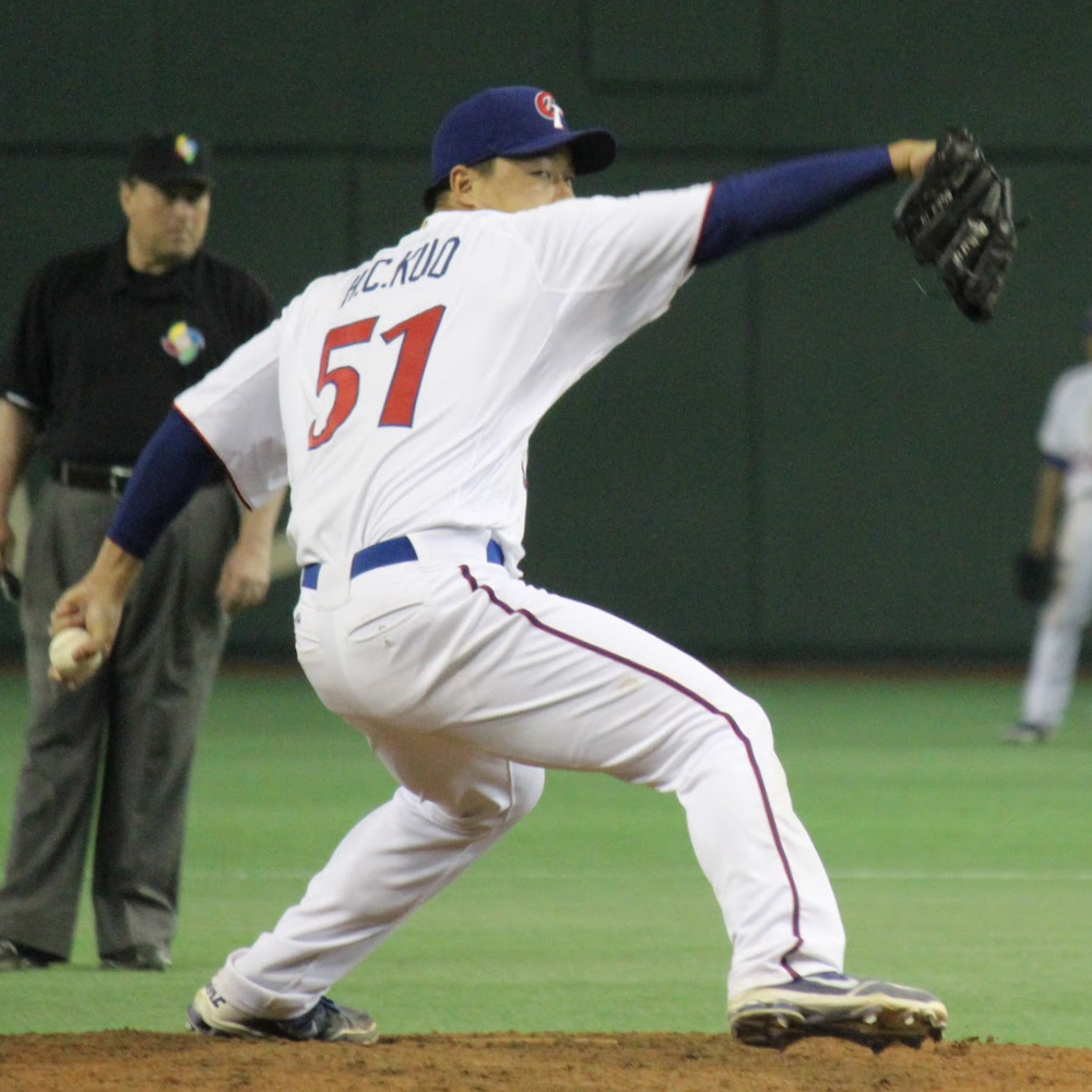 Hong-Chih Kuo